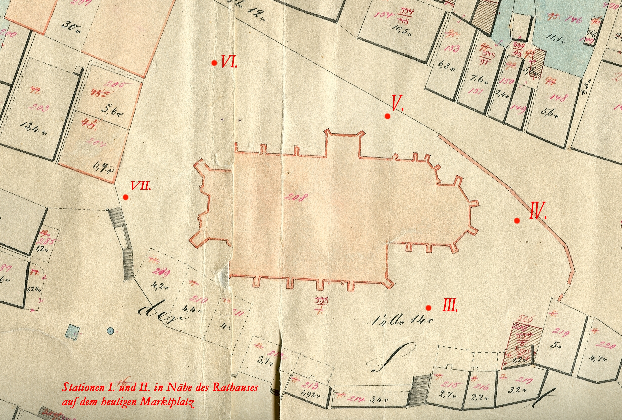 Lageplan der vermutlichen Kreuzwegstandorte